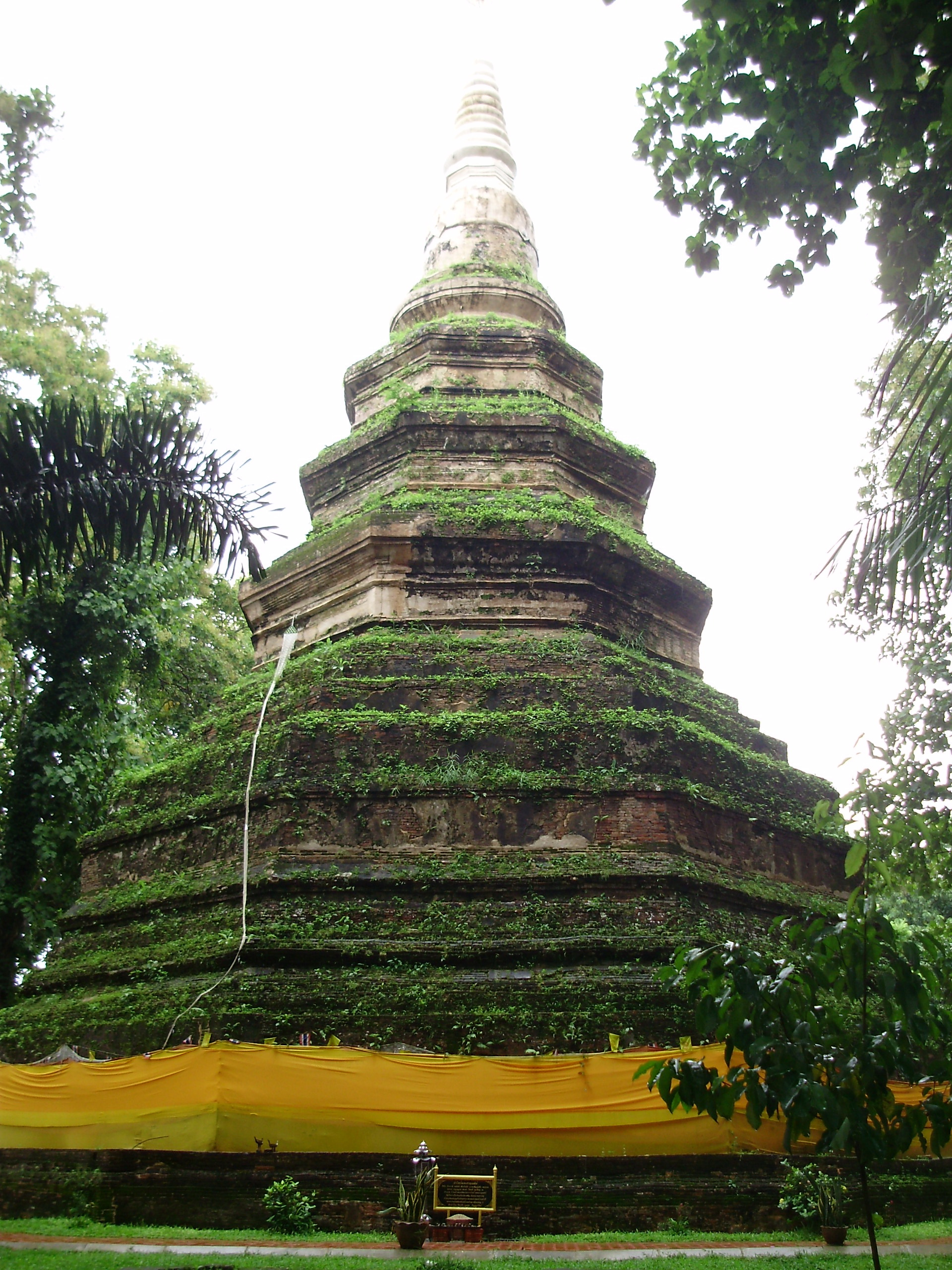 วัดเจดีย์หลวง ต.เวียง อ.เชียงแสน จ.เชียงราย